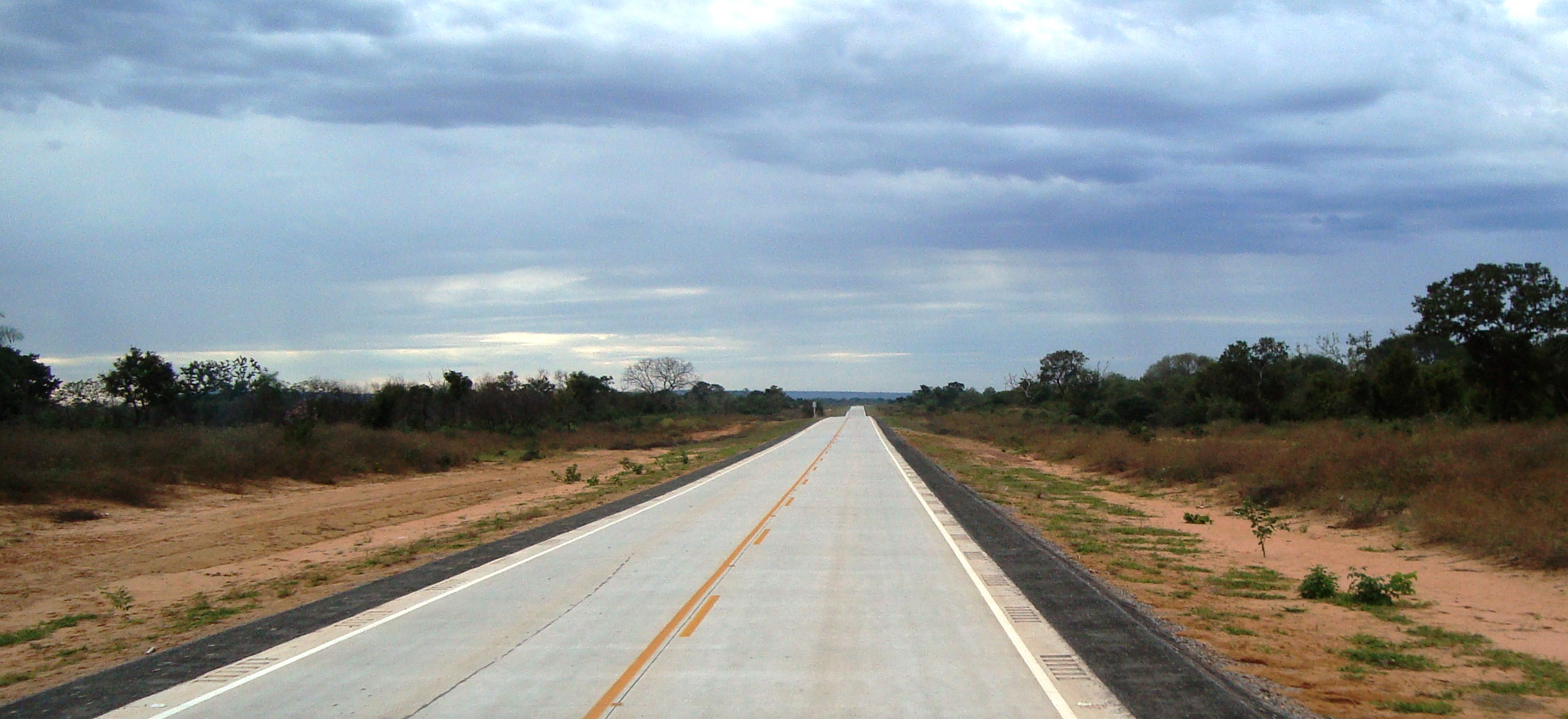 Carretera que conecta Bolivia con Brasil a través de Puerto Quijarro (Este, Departamento de Santa Cruz).